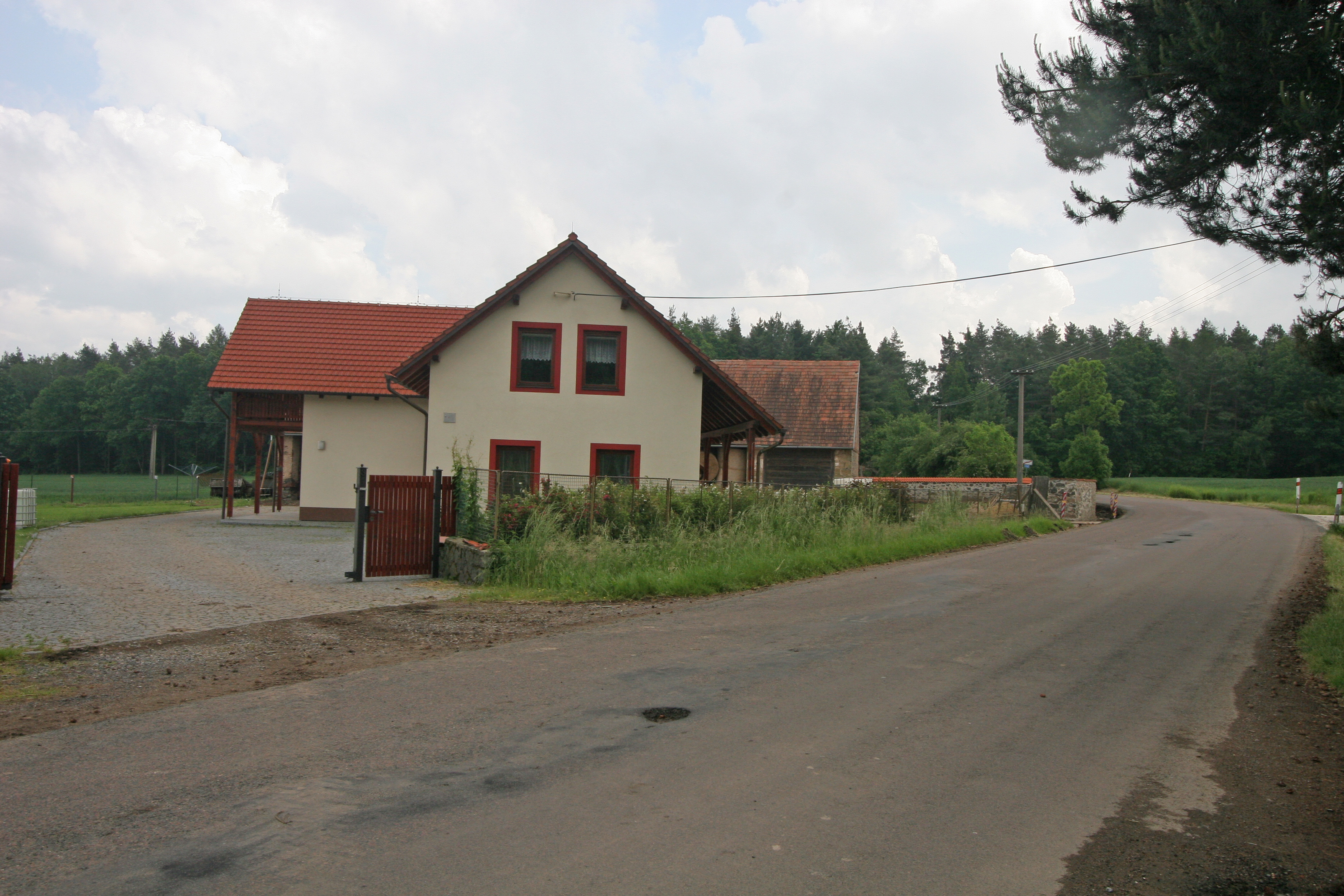 Lipina penzion